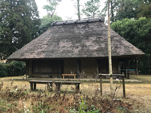 宮崎県総合博物館民家園に移築復元された 五ヶ瀬町「旧藤田家住宅」